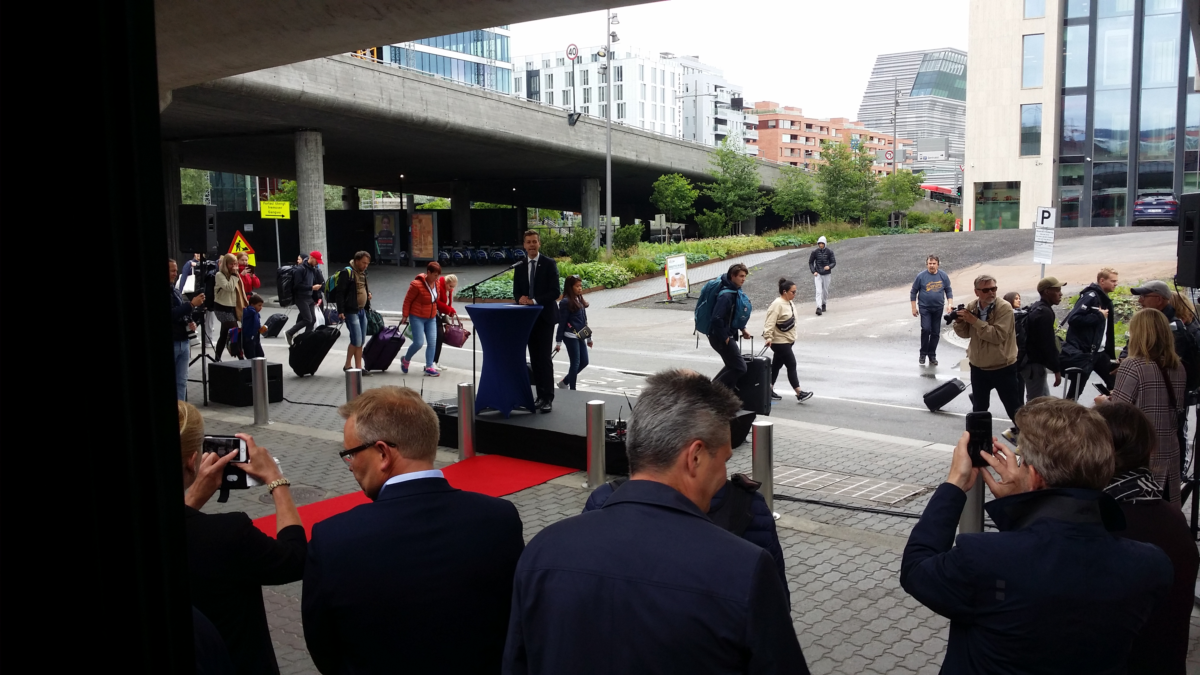 Samferdselsminister Knut Arild Hareide taler på Oslo S etter at SJ Norges første tog fra Trondheim har ankommet. Togets passasjerer er på vei av i bakgrunnen.